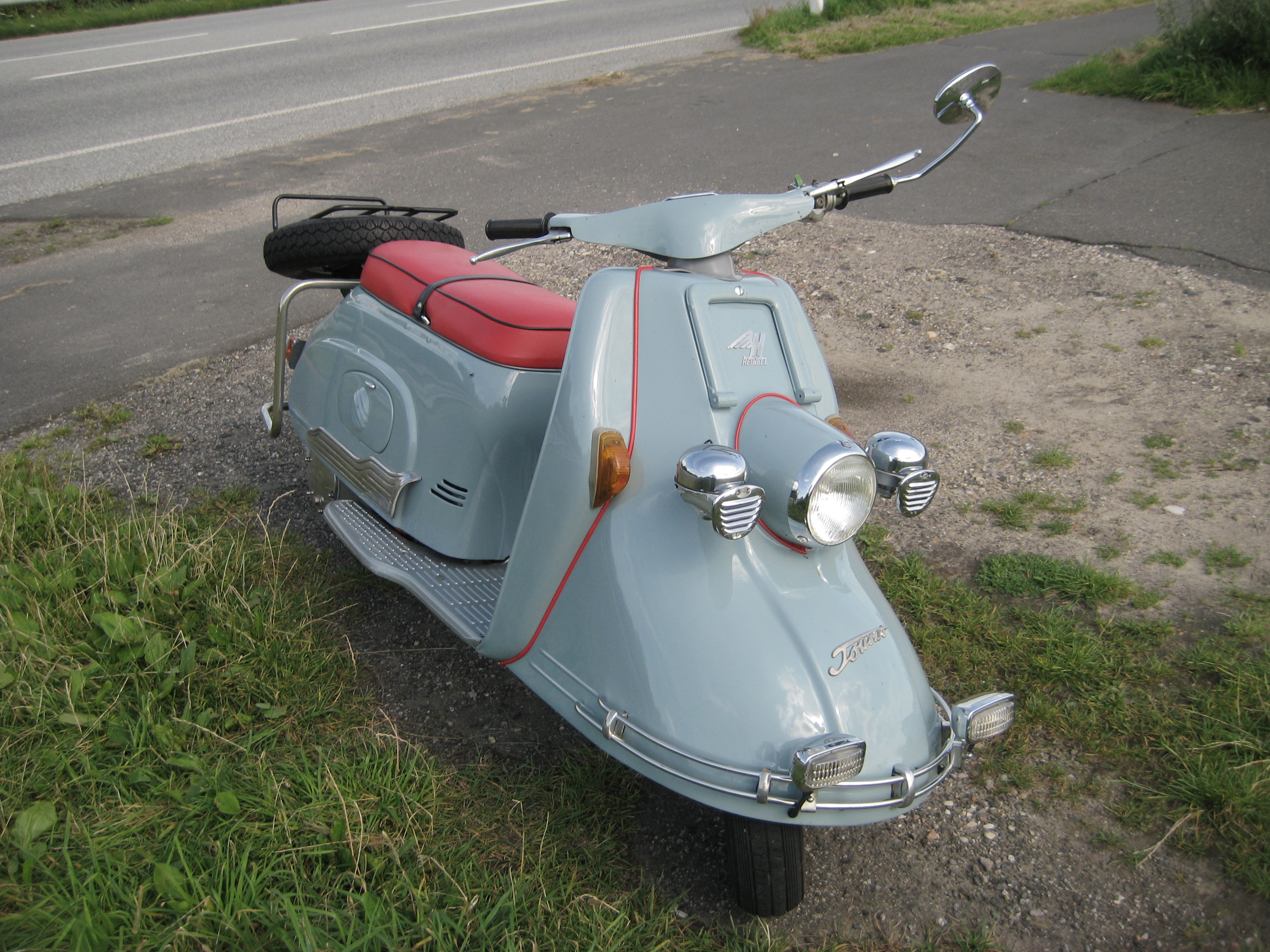 Heinkel Motorroller, aufgenommen am Stoer-Sperrwerk